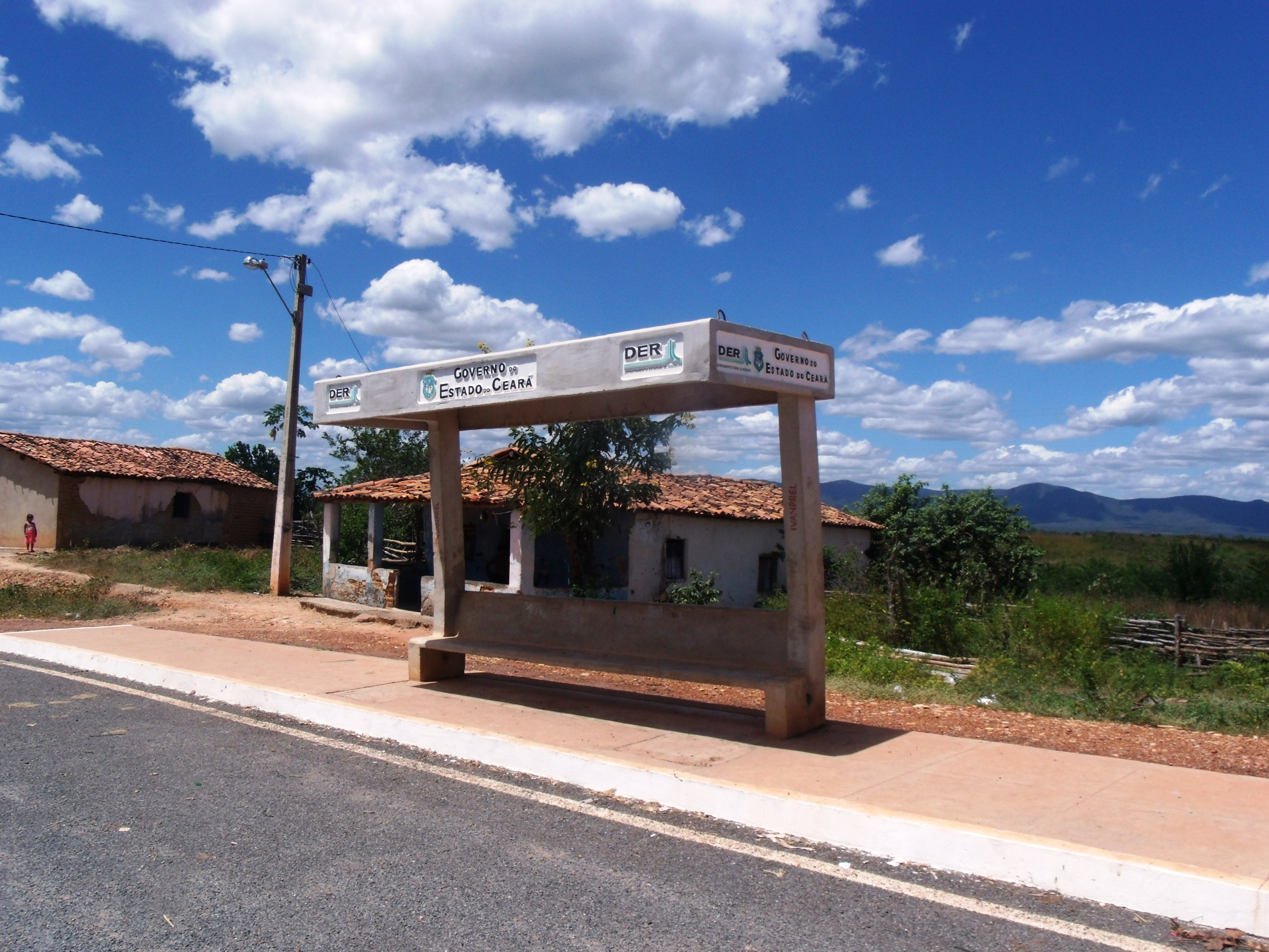 Arquitetura de um ponto de ônibus na rodovia CE-240 no povoado Boqueirão em Coreaú, no Ceará.